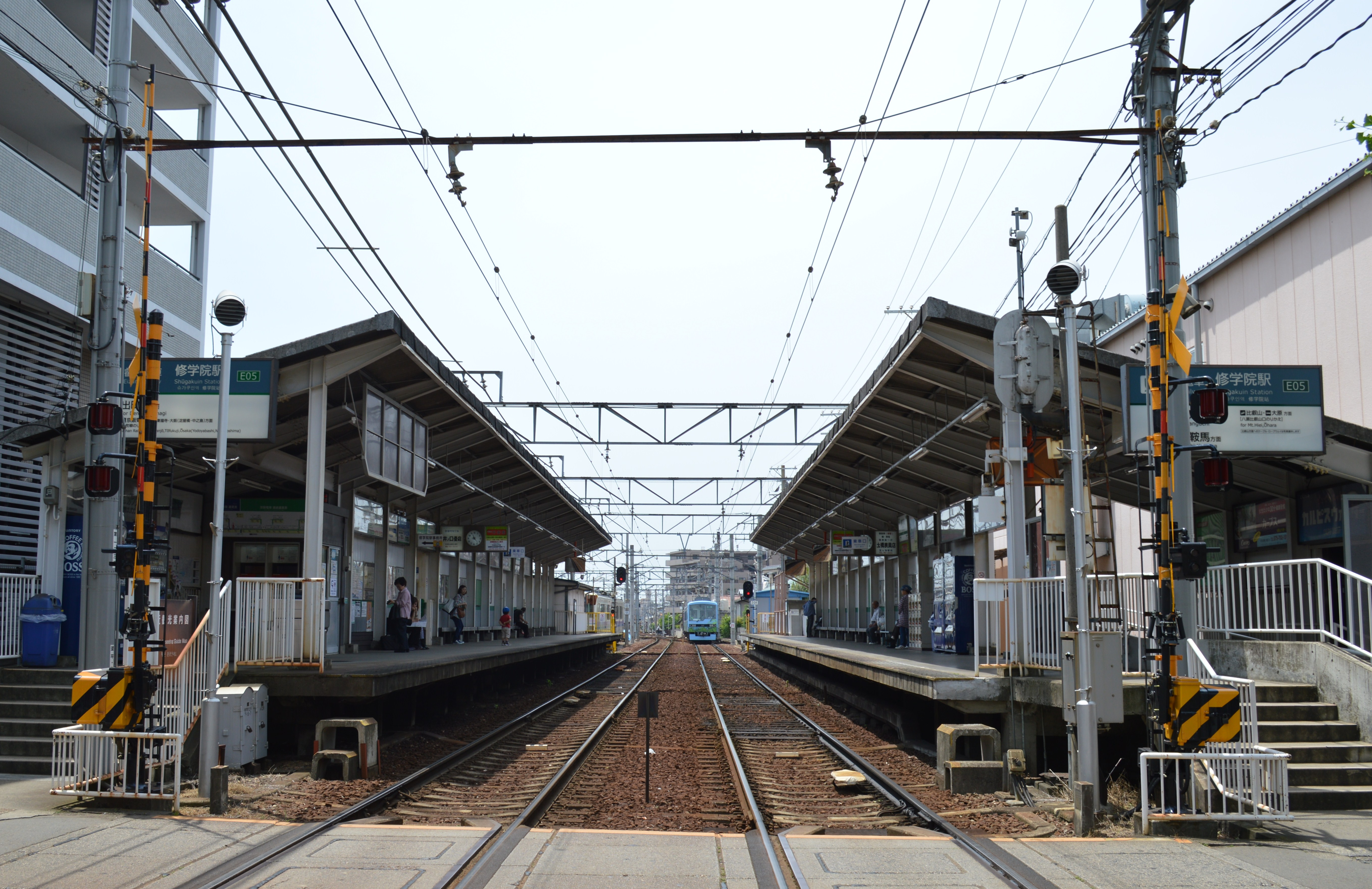 京都市左京区山端 叡山電鉄叡山本線修学院駅 駅すぐ北側の北山通から撮影。左側が出町柳駅行きホームで、左端のマンションの2階に叡山電鉄運輸課があり、定期券や各種乗車券が販売されている。駅に進入中のデオ800系（815-816）が確認できる。